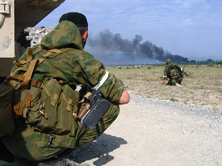 August 2008. Battalion Vostok in South Ossetia (Батальон «Восток» в Южной Осетии)